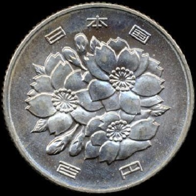 100 Yen Münze_Rückseite